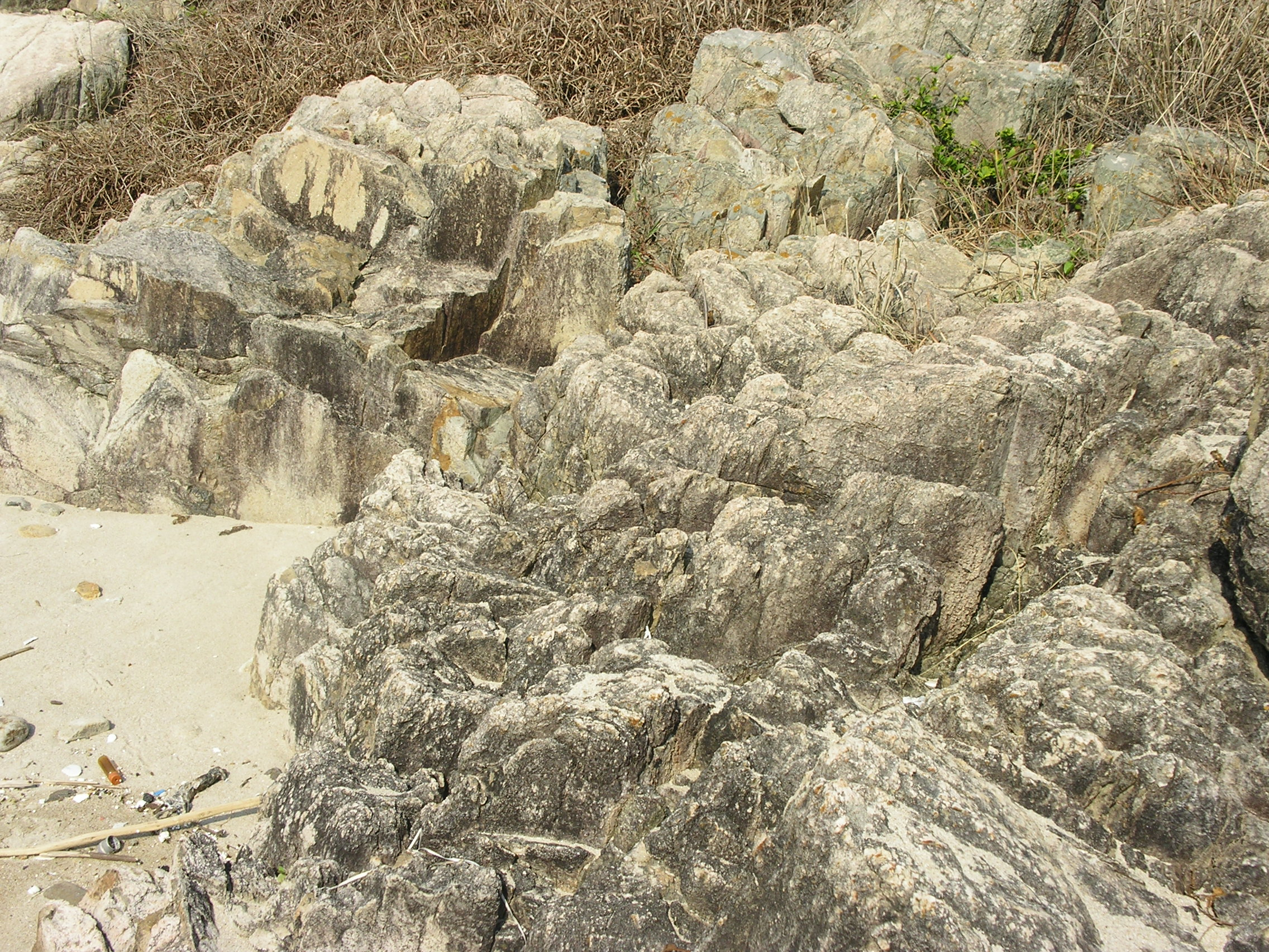 西灣一角的污染物及垃圾。